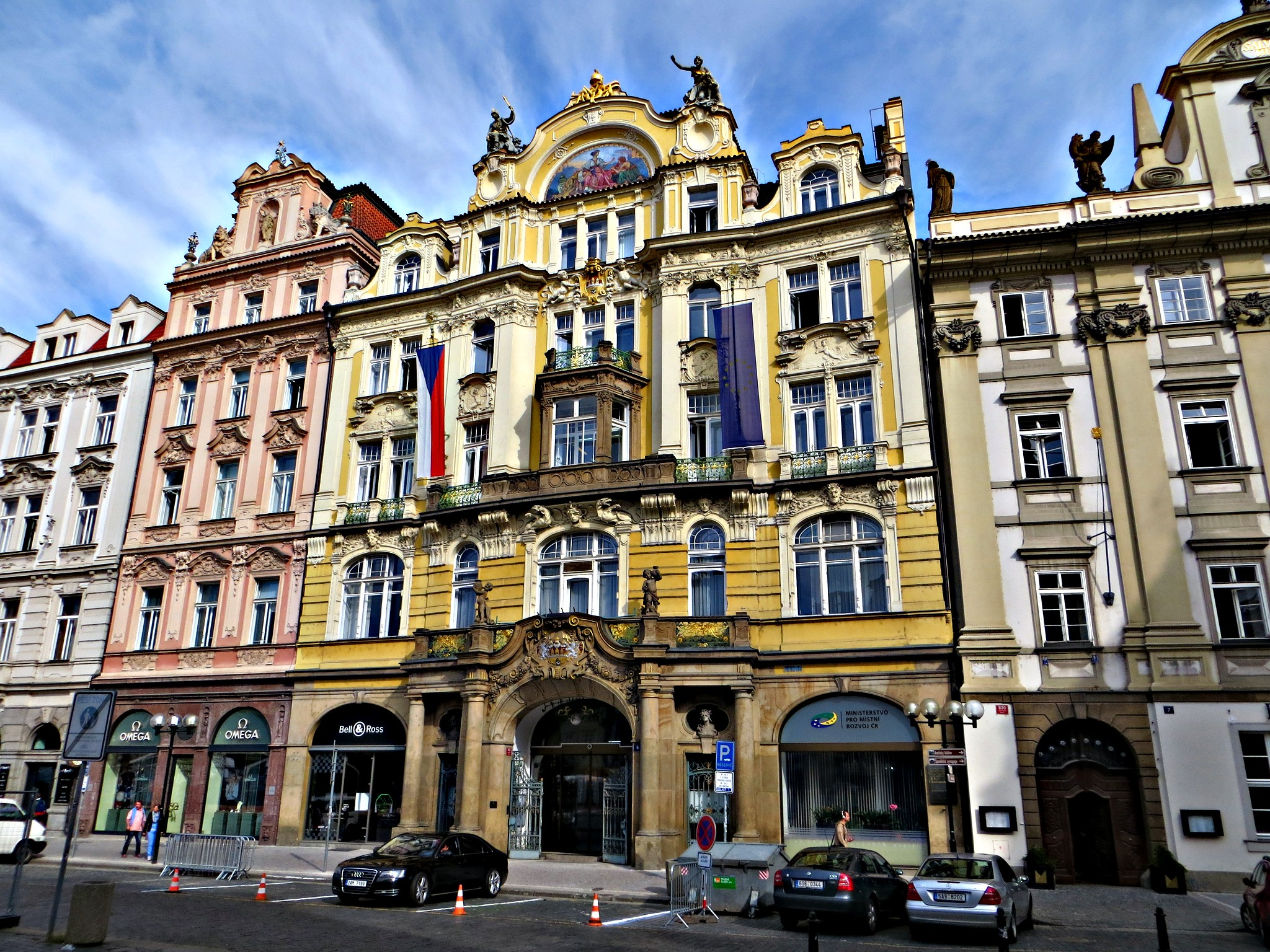 Ministerstvo pro místní rozvoj